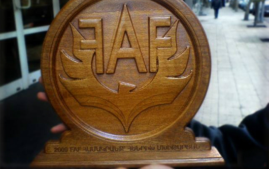 FAF համակրանք 2009